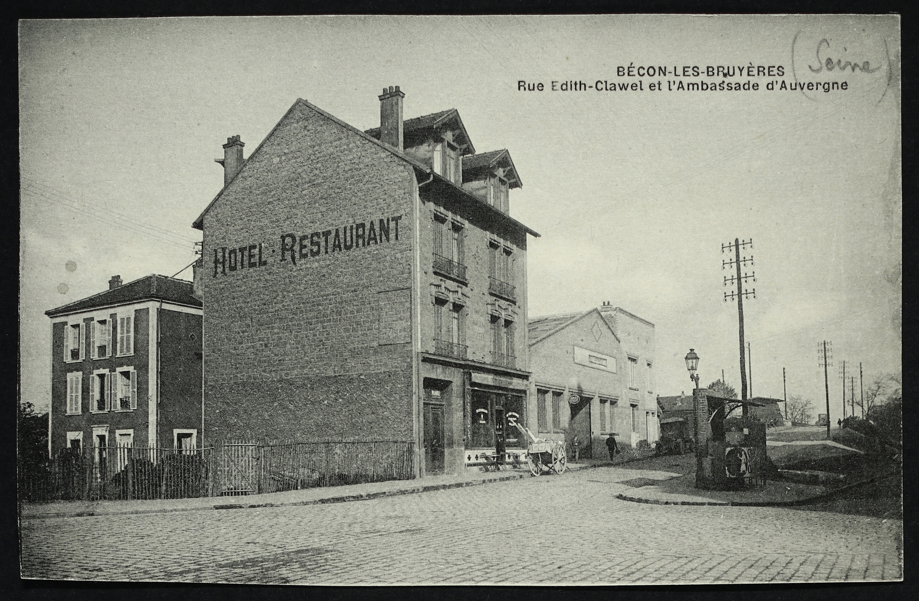 Courbevoie. Rue Edith-Cavell et ambassade d'Auvergne